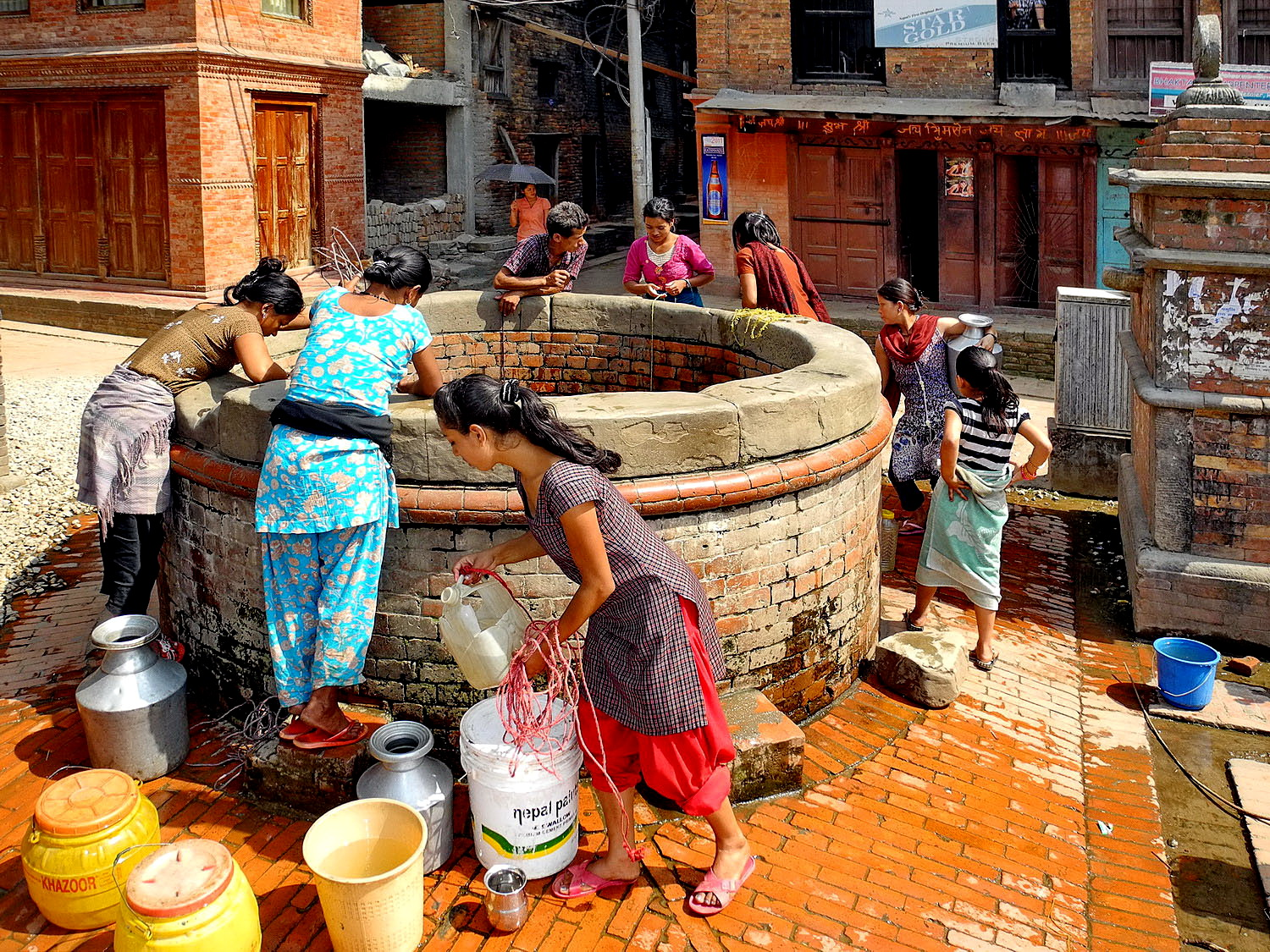 corvée d'eau à Bhaktapur (Népal)